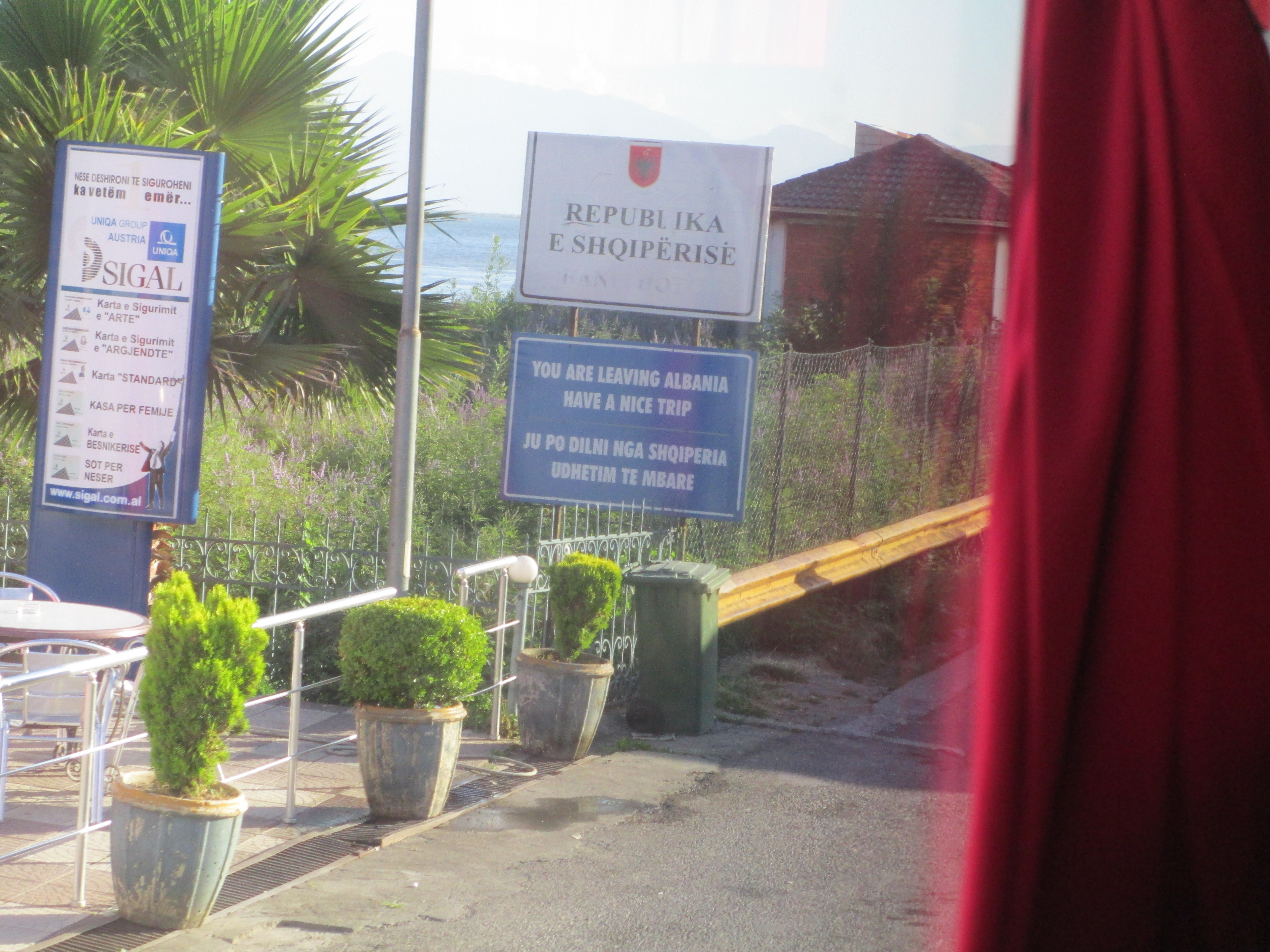 Albanian border point with Montenegro